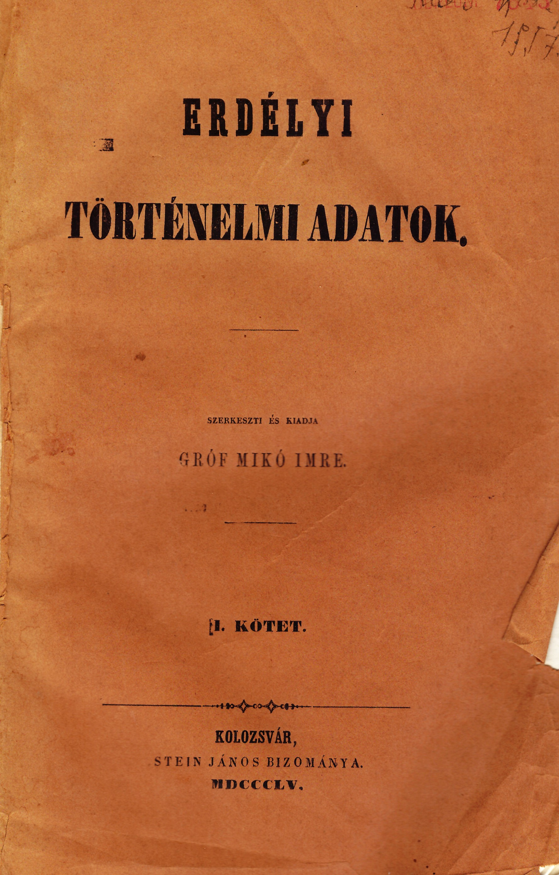 Erdélyi Történelmi Adatok 1. kötet